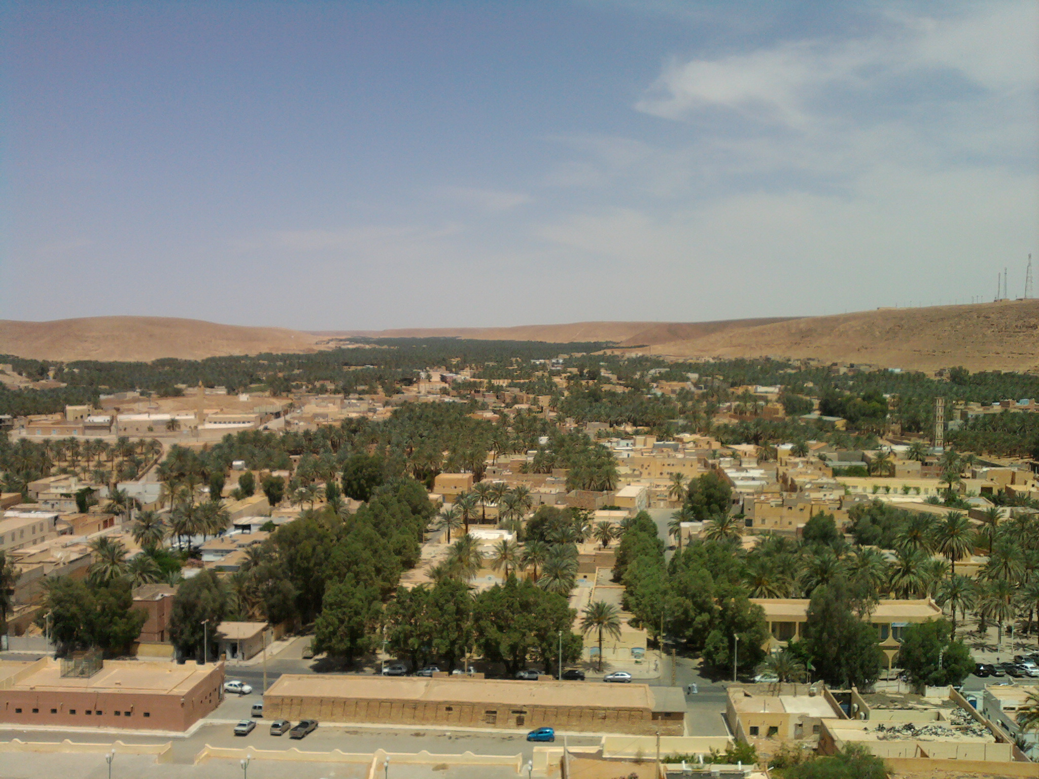 منظر من فوق جبل سيدي مولاي عبد القادر